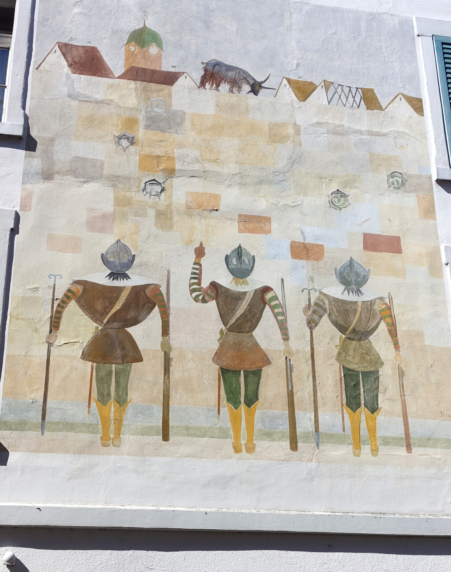 Wandbild, Schwedische Truppen belagern Rheinfelden, 1962. Von Jakob Strasser (1896–1978) Maler. Winkelgasse, Rheinfelden, Schweiz